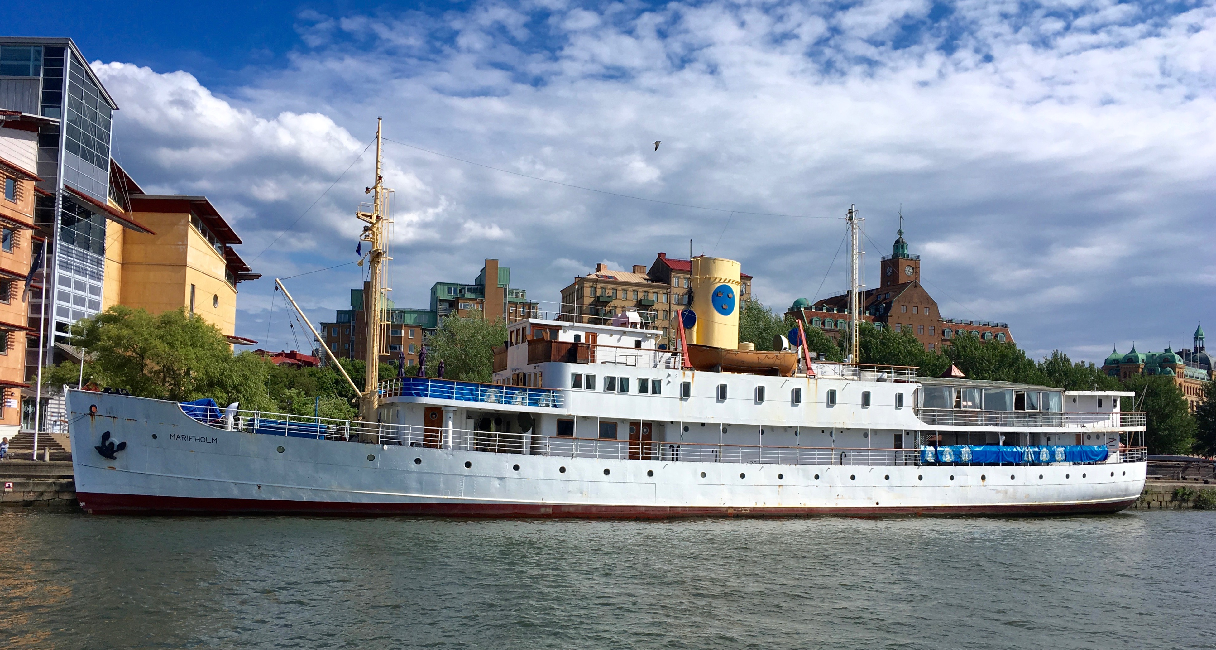 S/S Marieholm byggdes 1934 på Odense Stålskibværft i Odense, Danmark, för AB Svenska Amerika Linien. Fartyget blev k-märkt 2010.